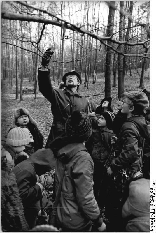 Berlin, Naturkundlicher Vortrag für Schüler ADN-ZB Reiche 20.2.1980-Berlin: Das Naturlehrkabinett des Forstwirtschaftbetriebes Berlin am Teufelssee besuchten innerhalb der Ferienspiele Mädchen und Jungen der 1. bis 4. Klassen Köpenicker und Lichtenberger Schulen. Auf dem Naturlehrpfad machte Revierförster Arnold Hankel, Leiter des Kabinetts, die Kinder auf Gehölze und Tierspuren aufmerksam.